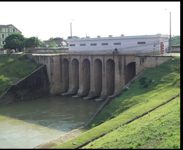 Cầu mù bà bắc qua kênh đào.được xây dựng thời pháp chiếm đóng